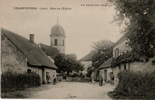 Rue de l'église à Champdivers, Jura (Début XXe siècle).